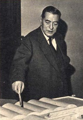 Imprenditore Pasquale Alécce, Roma, 1952